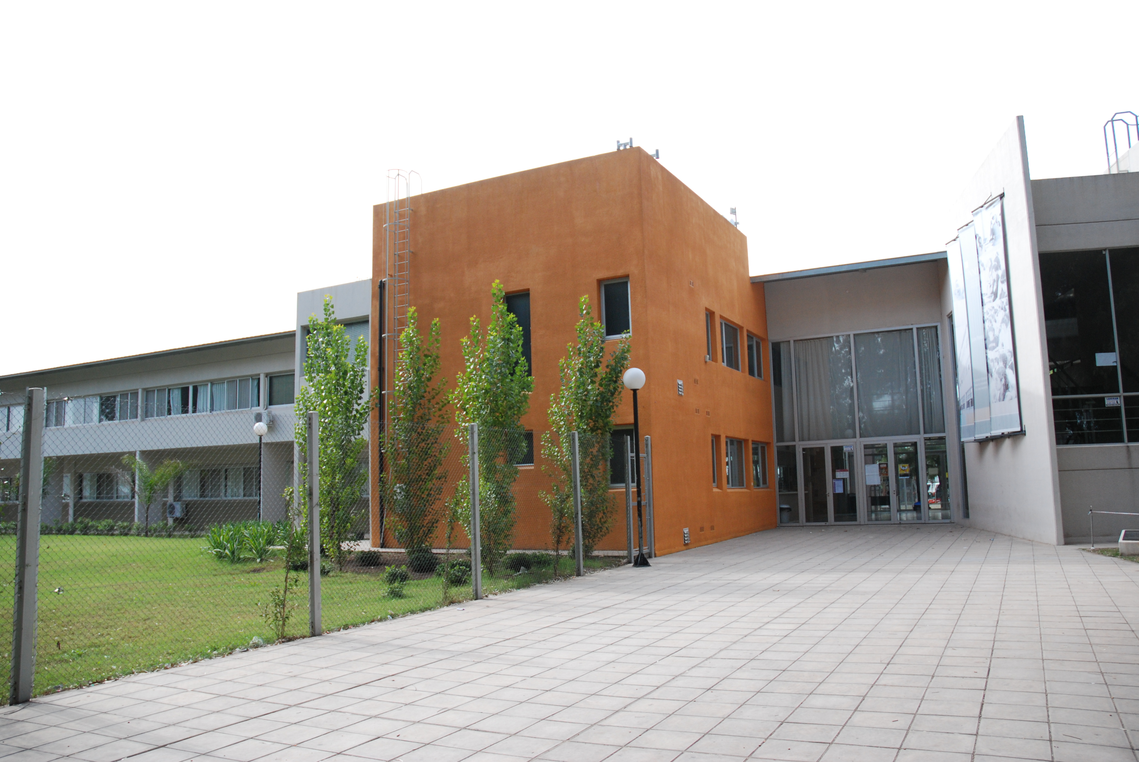 Edificio principal de la Sede Pergamino de la Universidad Nacional del Noroeste de la Provincia de Buenos Aires (UNNOBA), ubicado en Monteagudo 2772.